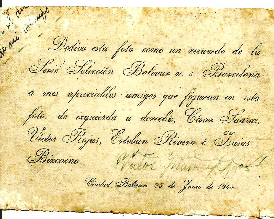 Reverso de fotografía, regalo de Víctor Davalillo a su amigo César Suárez tras el encuentro Serie Selección Bolívar vs Barcelona